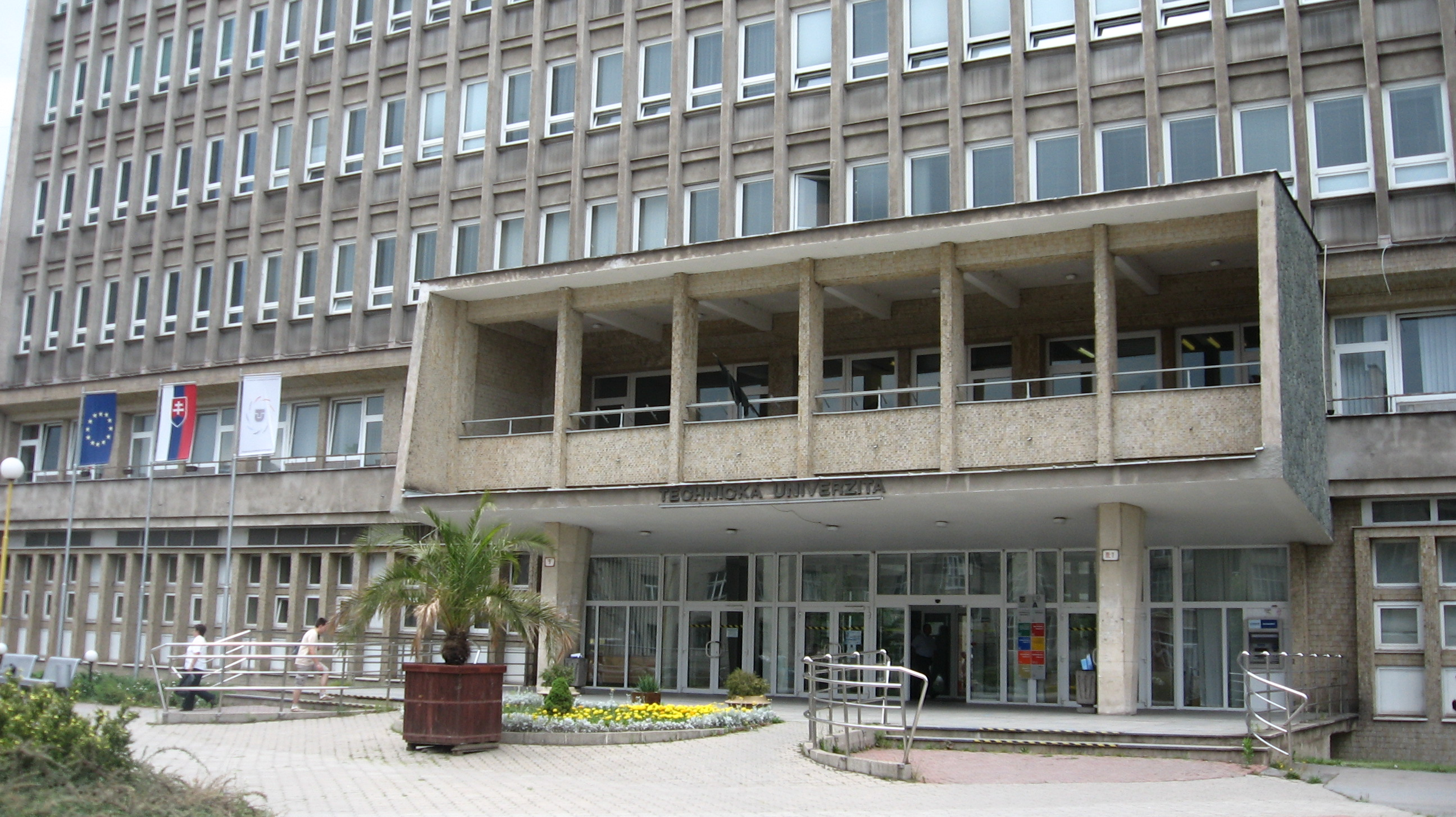 Vchod do hlavnej budovy